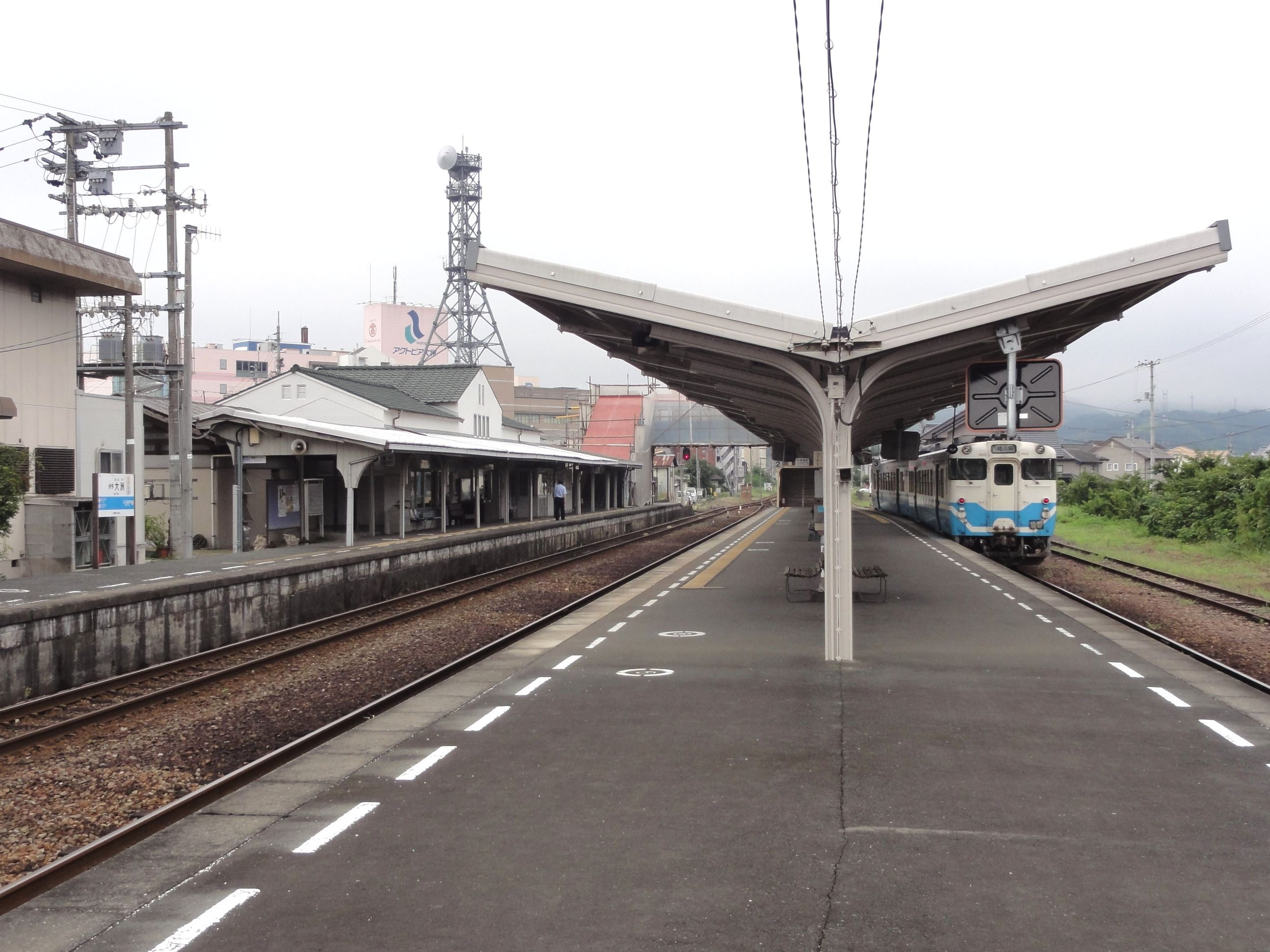 伊予大洲駅ホーム